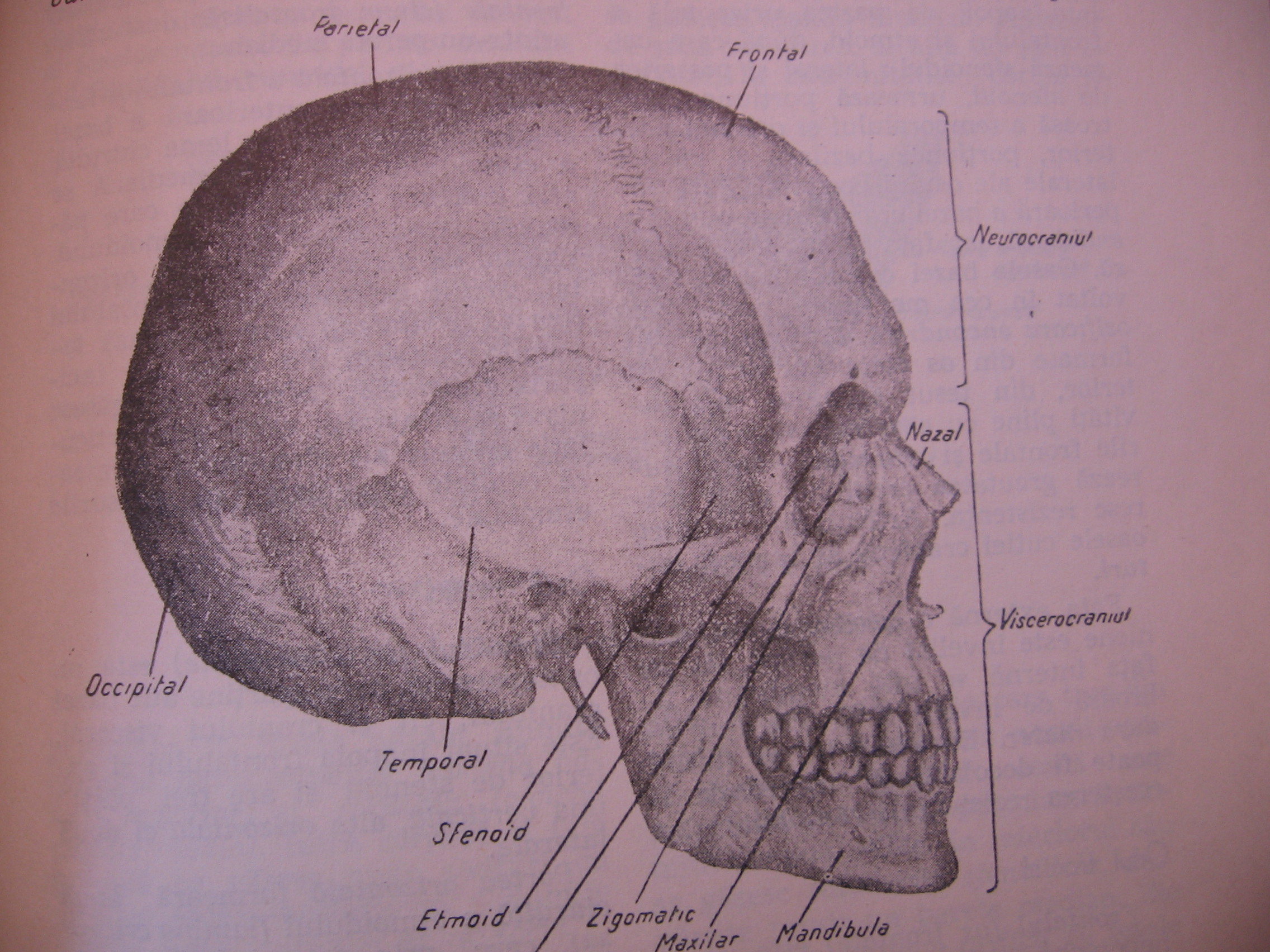 Craniul